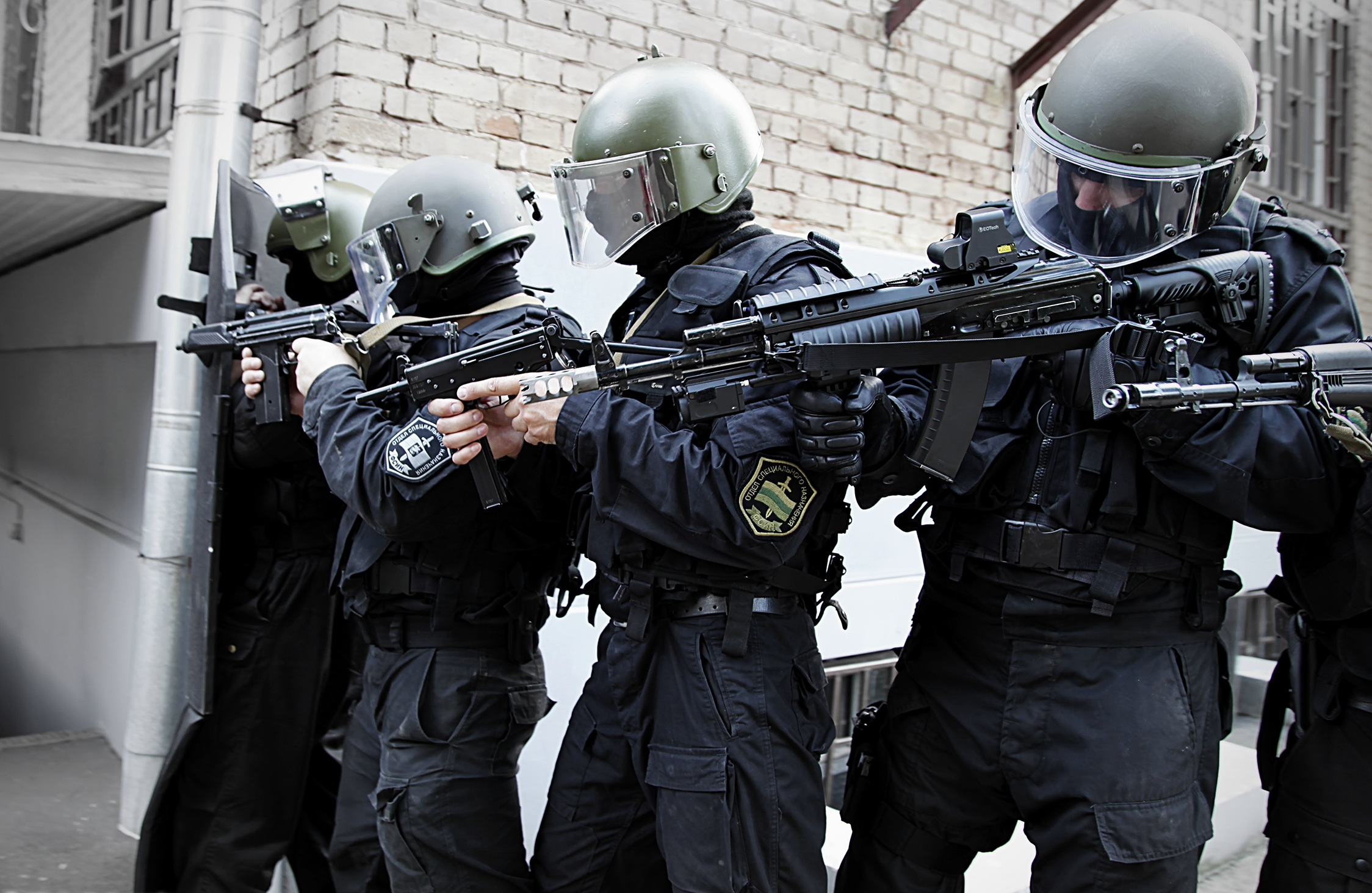 АК74М с обвесом от FAB Defense.